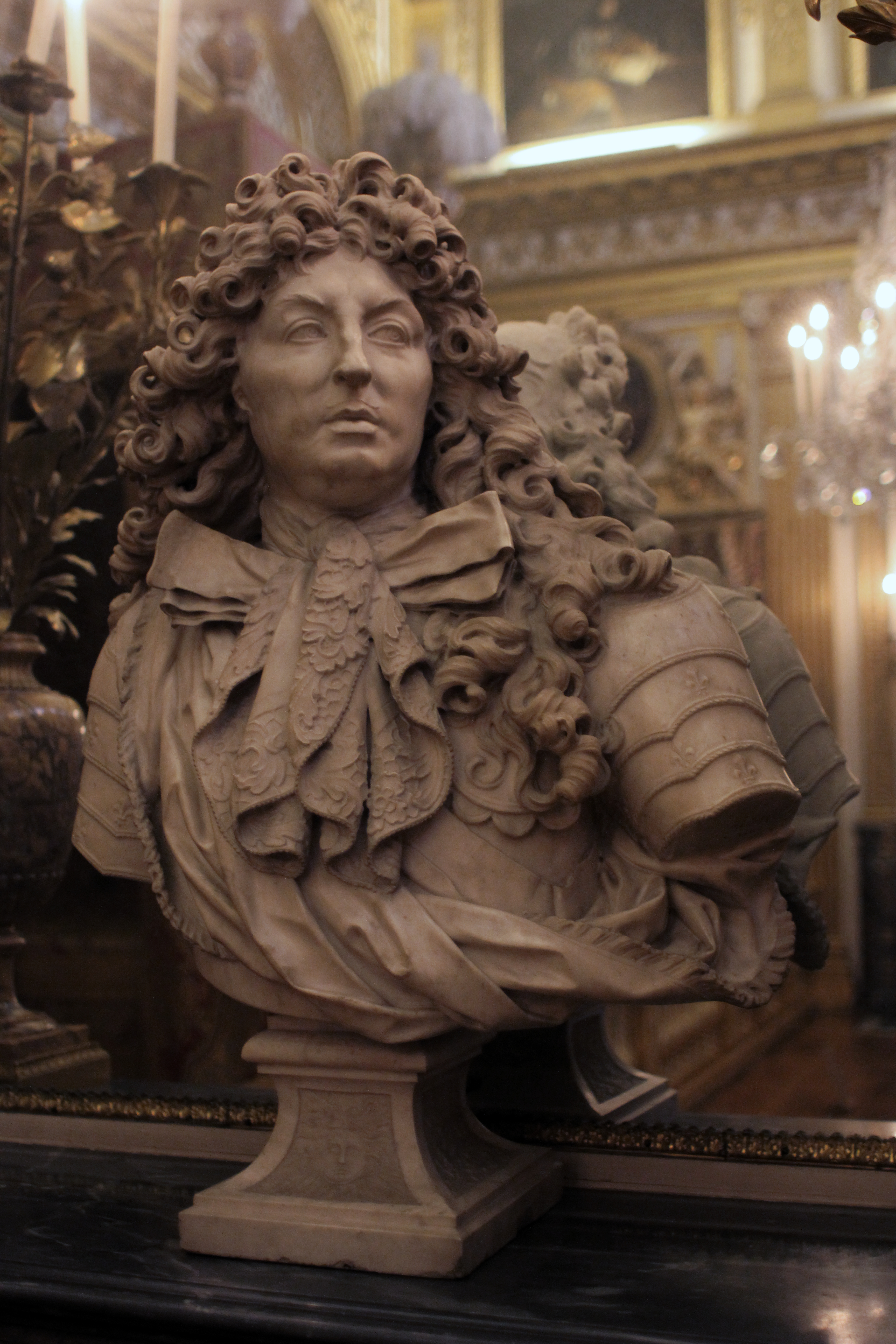 Versailles, chambre du roi, dessus de cheminée : buste de Louis XIV par Antoine Coysevox, encadré par deux candélabres livrés pour le Comte de Provence